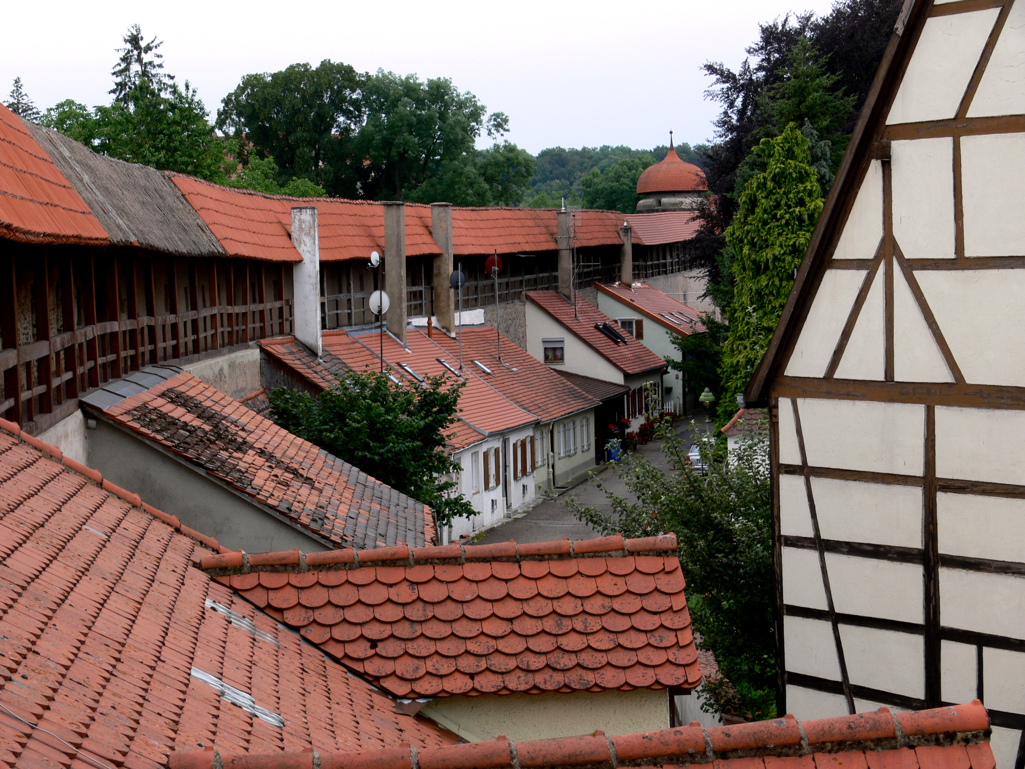 Nördlingen, Blick von der Stadtmauer